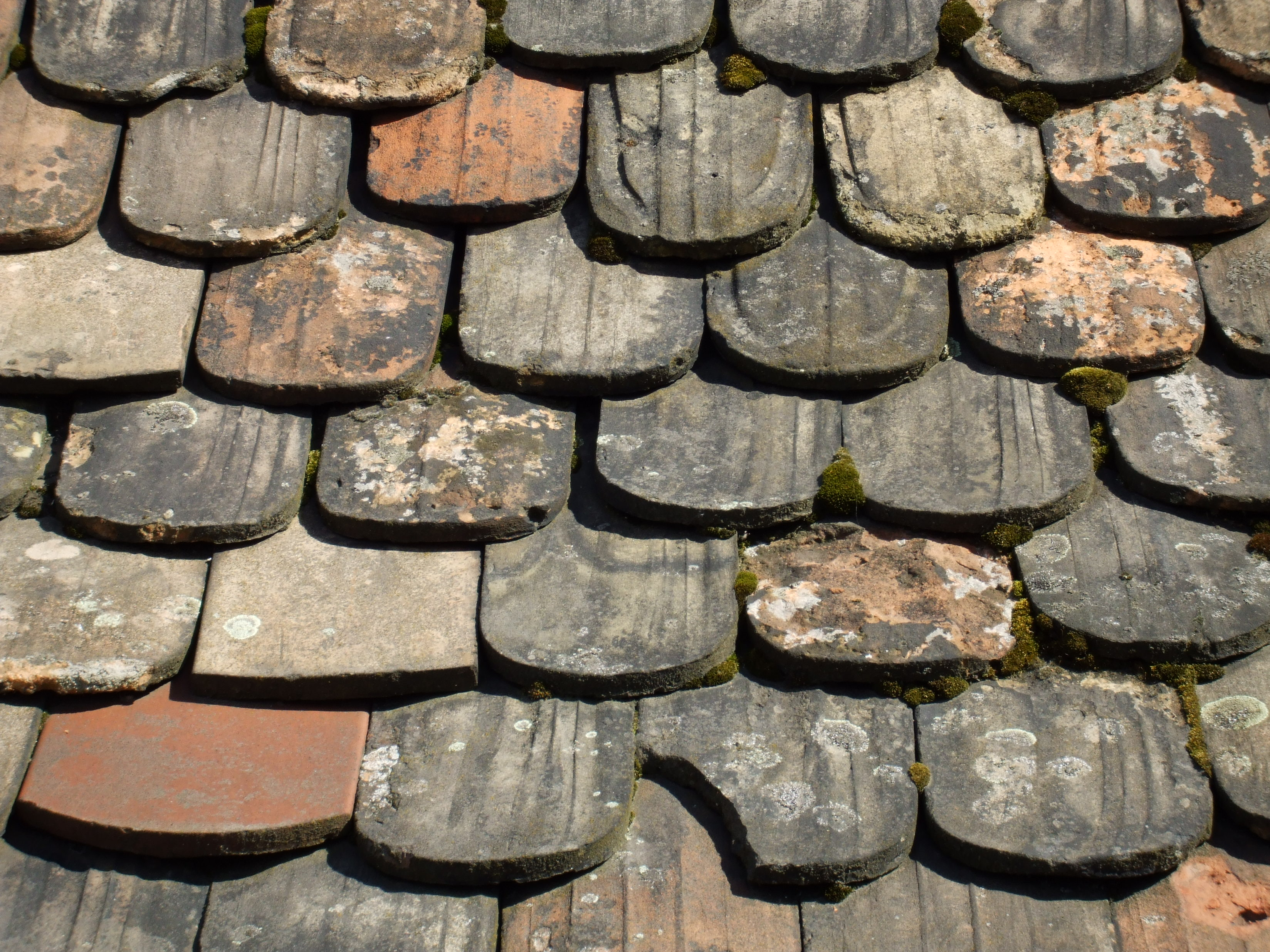 Strasbourg Petite France détail d’une toiture en tuiles Biberschwanz